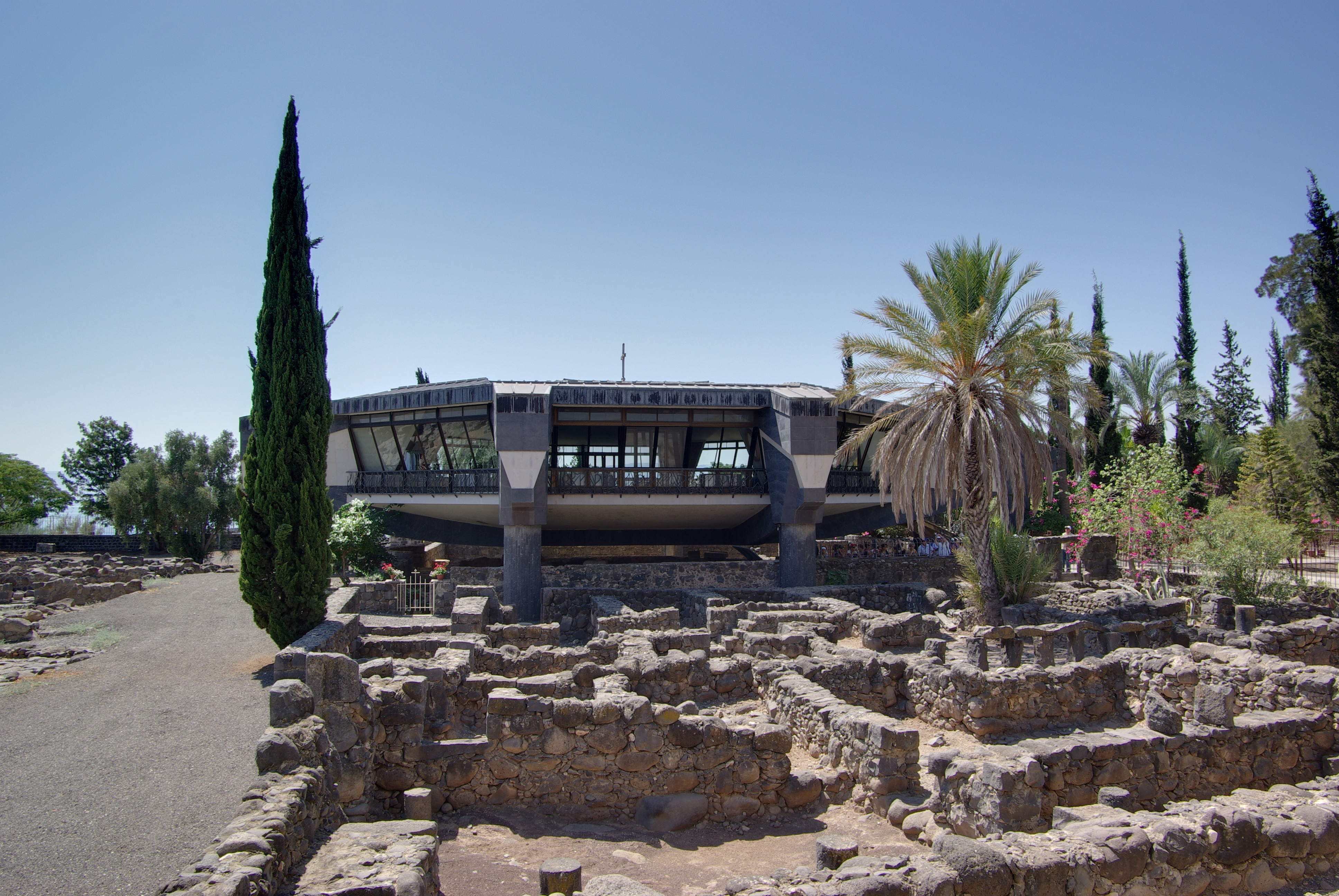 Kirche über dem Haus des Petrus